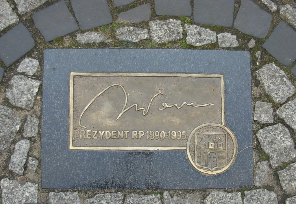 Bydgoska Aleja Autografów - Lech Wałęsa, 2008